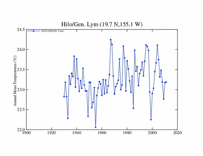 gráfico de termografía diaria, casilla meteo a 1,5 m de 1929 a 2011